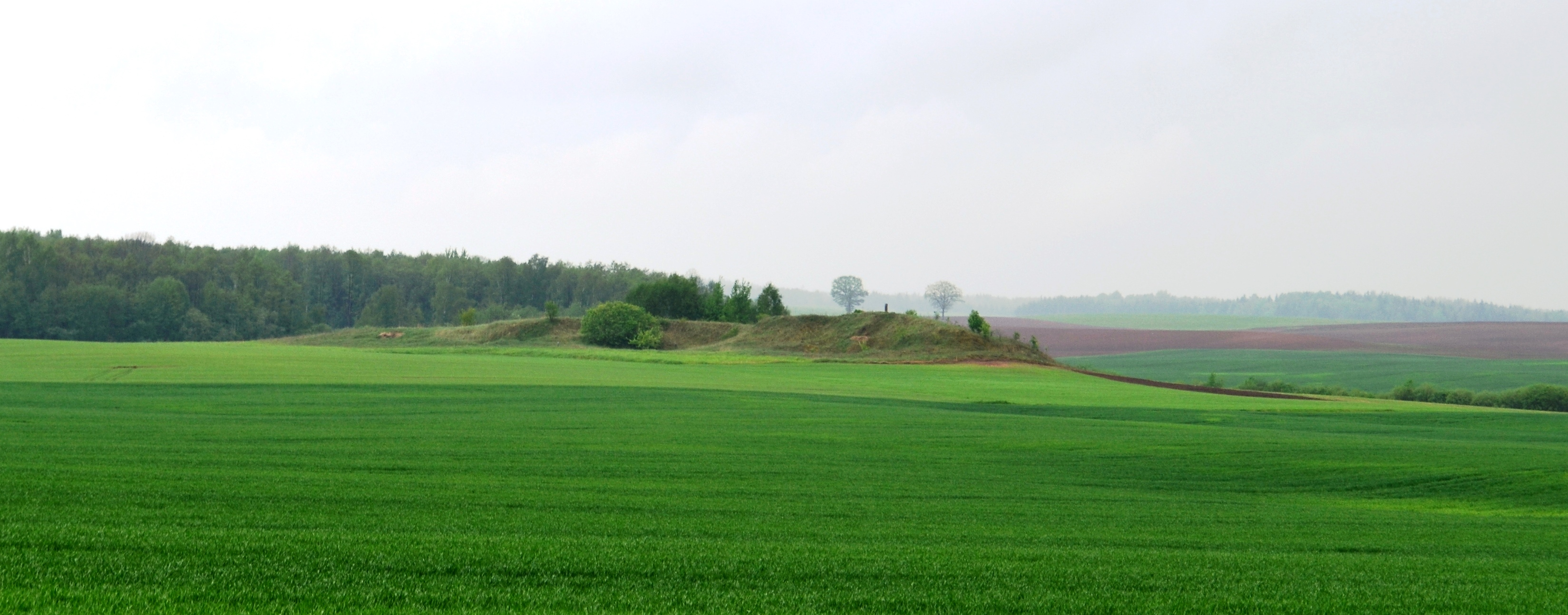 Senkapis, Preikapė, Kėdainių raj.